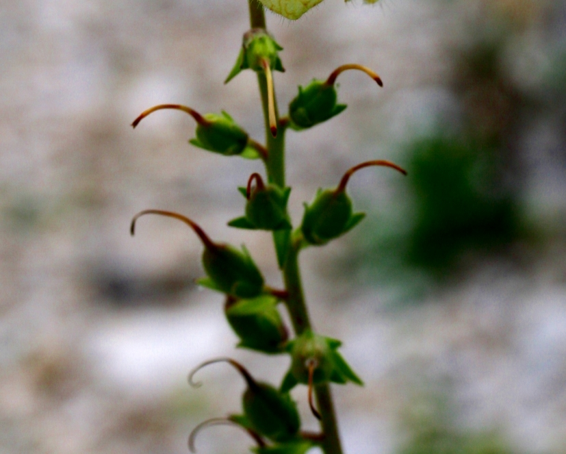 Digitalis_grandiflora (Digitale gialla grande) Località:"Giardino Botanico delle Alpi Orientali", Monte Faverghera (BL), 1500 m s.l.m.